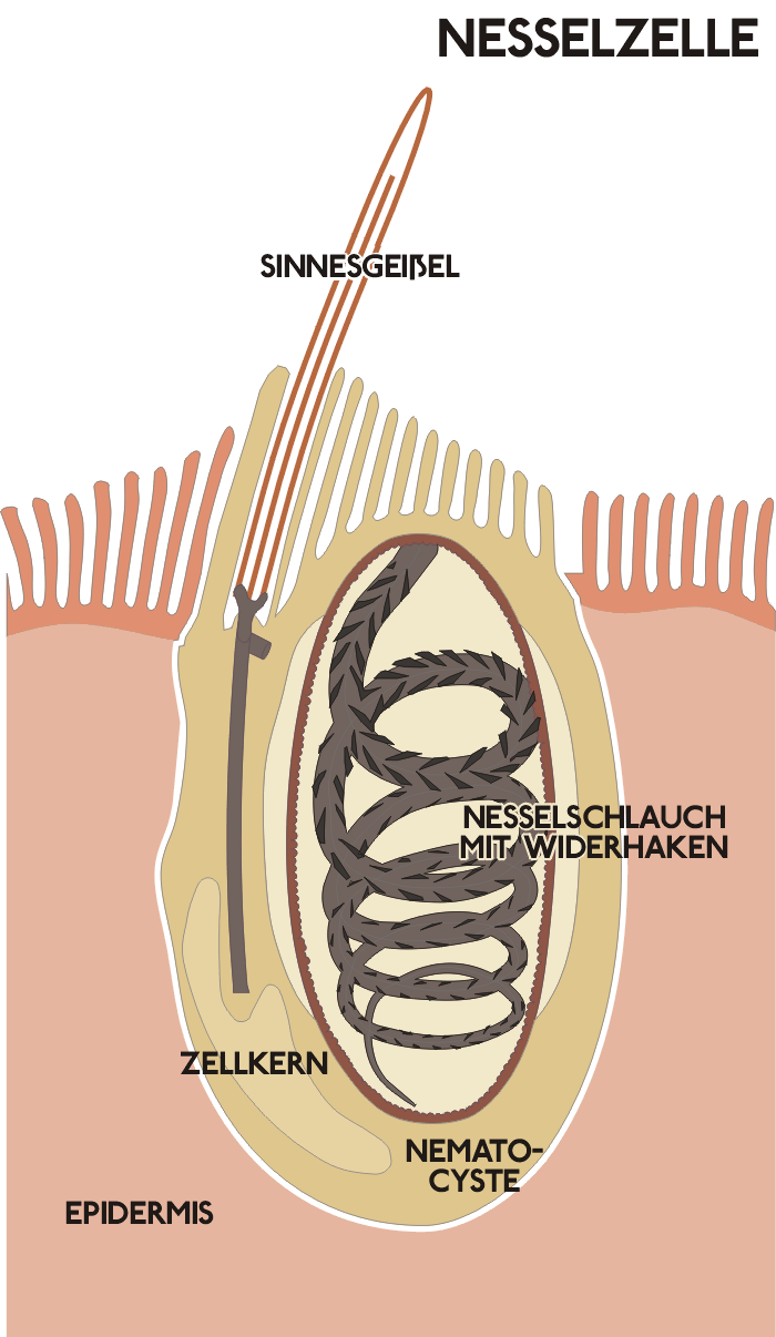 Nesselzelle